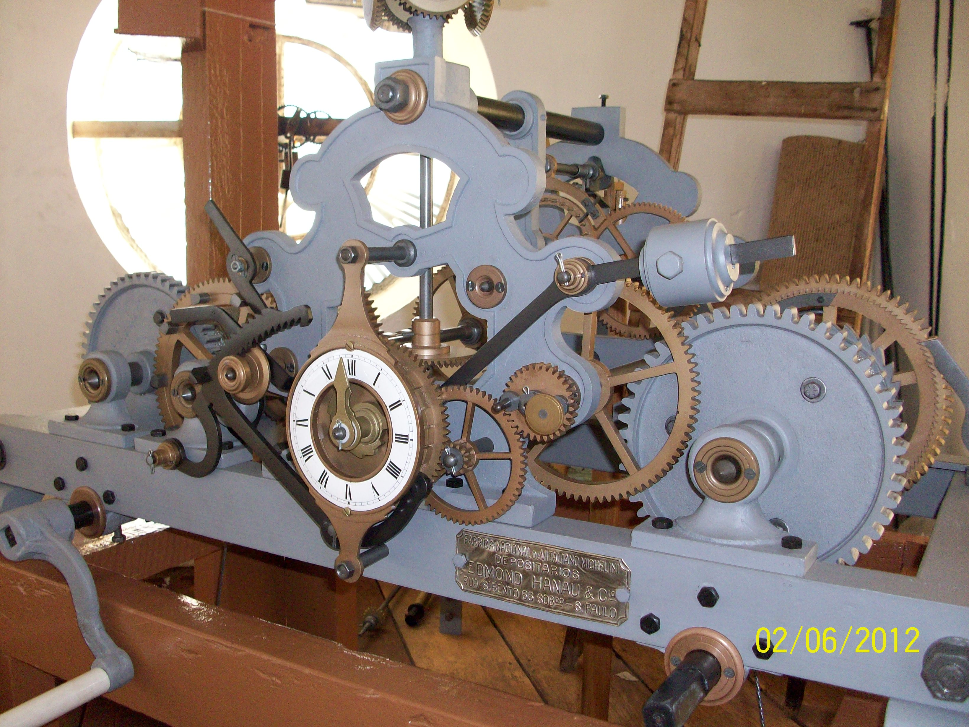 Mecanismo restaurado do relógio Michelini da Igreja Sto. Antonio em São Carlos - SP